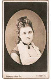 Hunyady Margit Kolozsvárott készült portréja